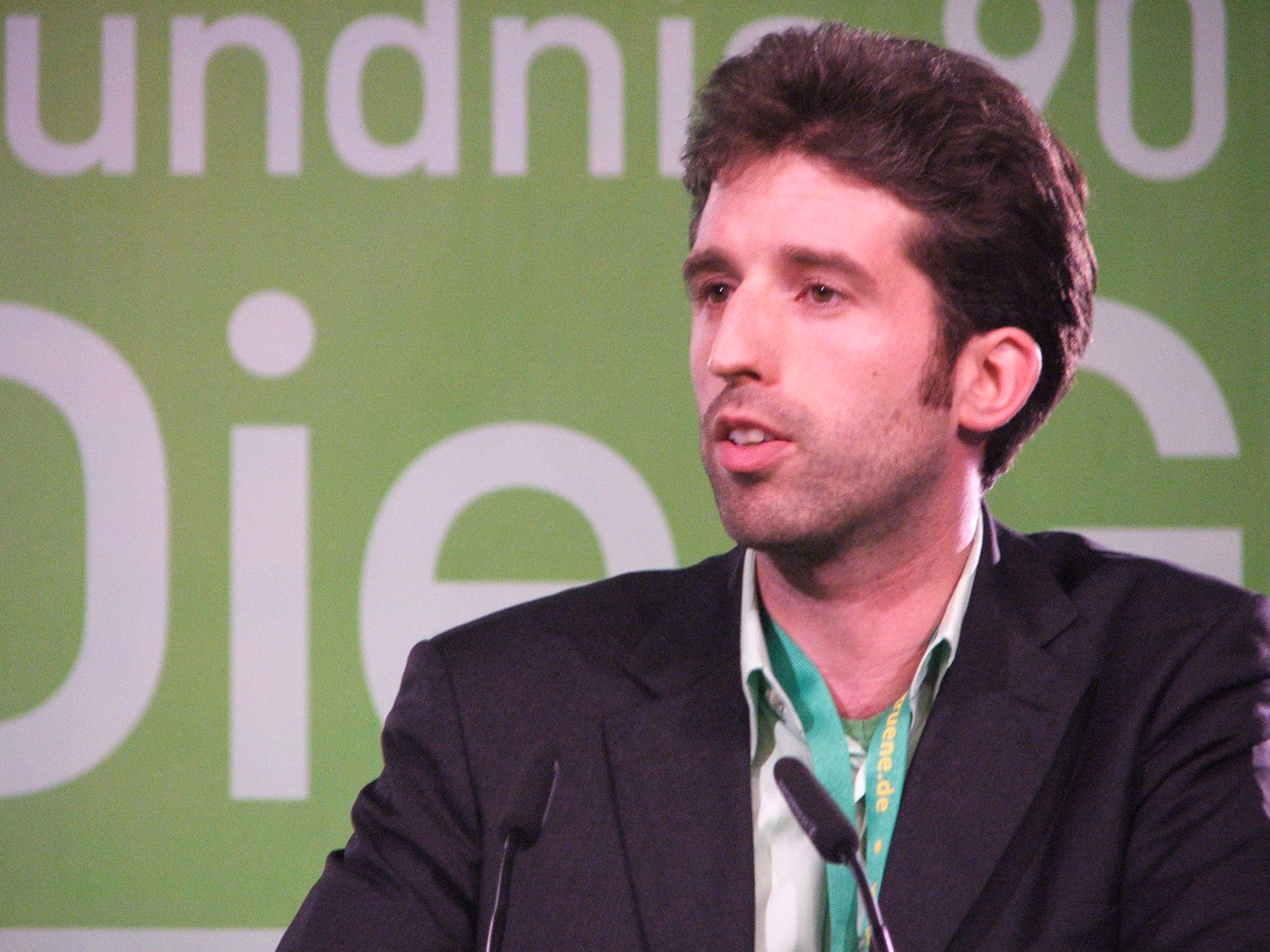 Boris Palmer, Oberbürgermeister von Tübingen, Mitglied von Bündnis 90/Die Grünen, in Köln